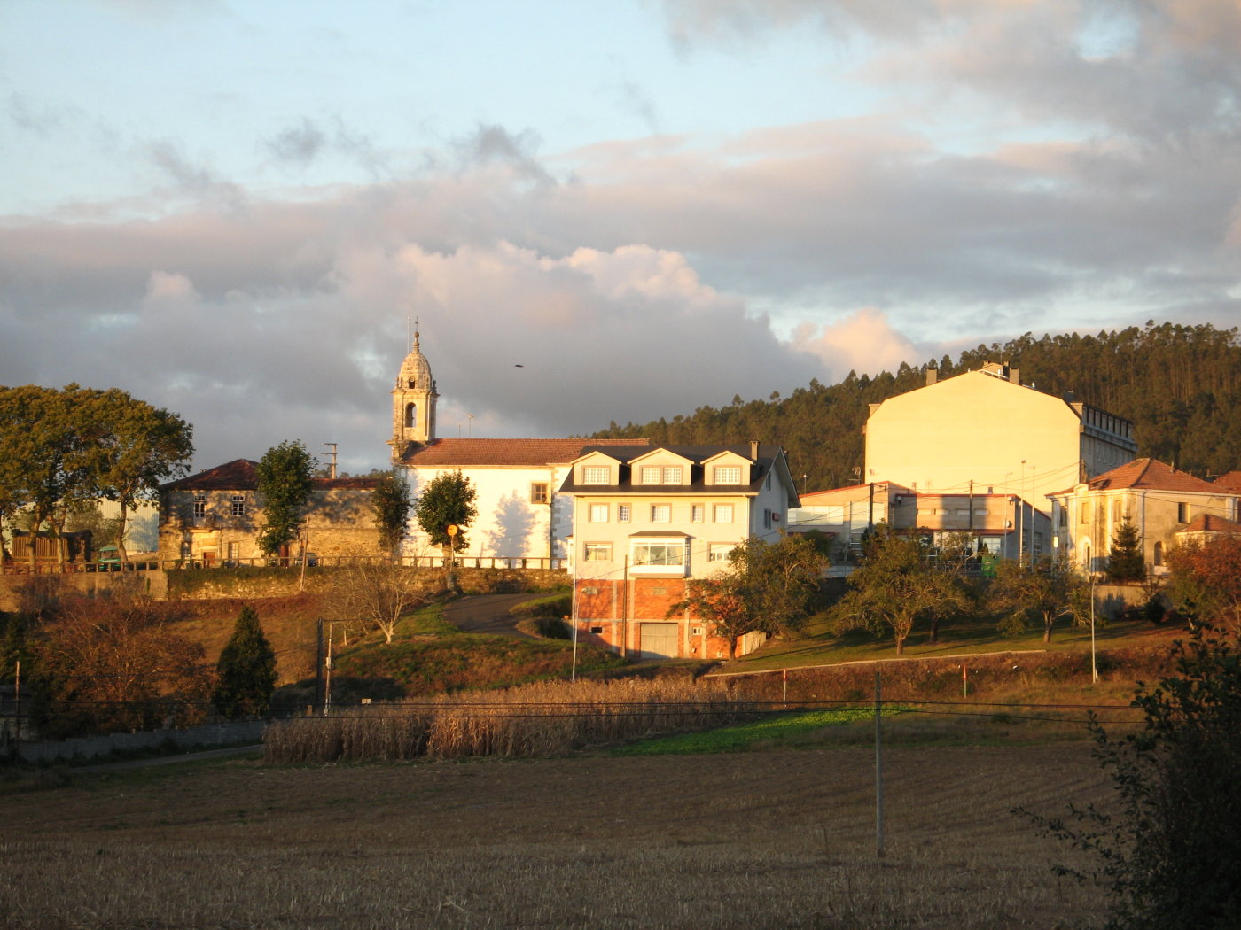 San Sadurniño